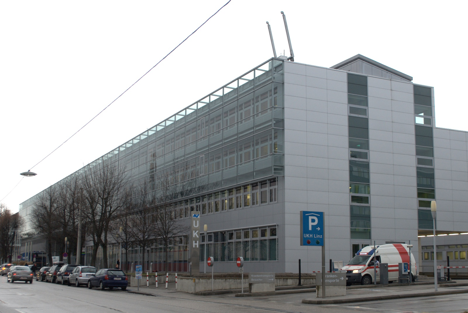 Unfallkrankenhaus Linz, Front an der Garnisonstraße